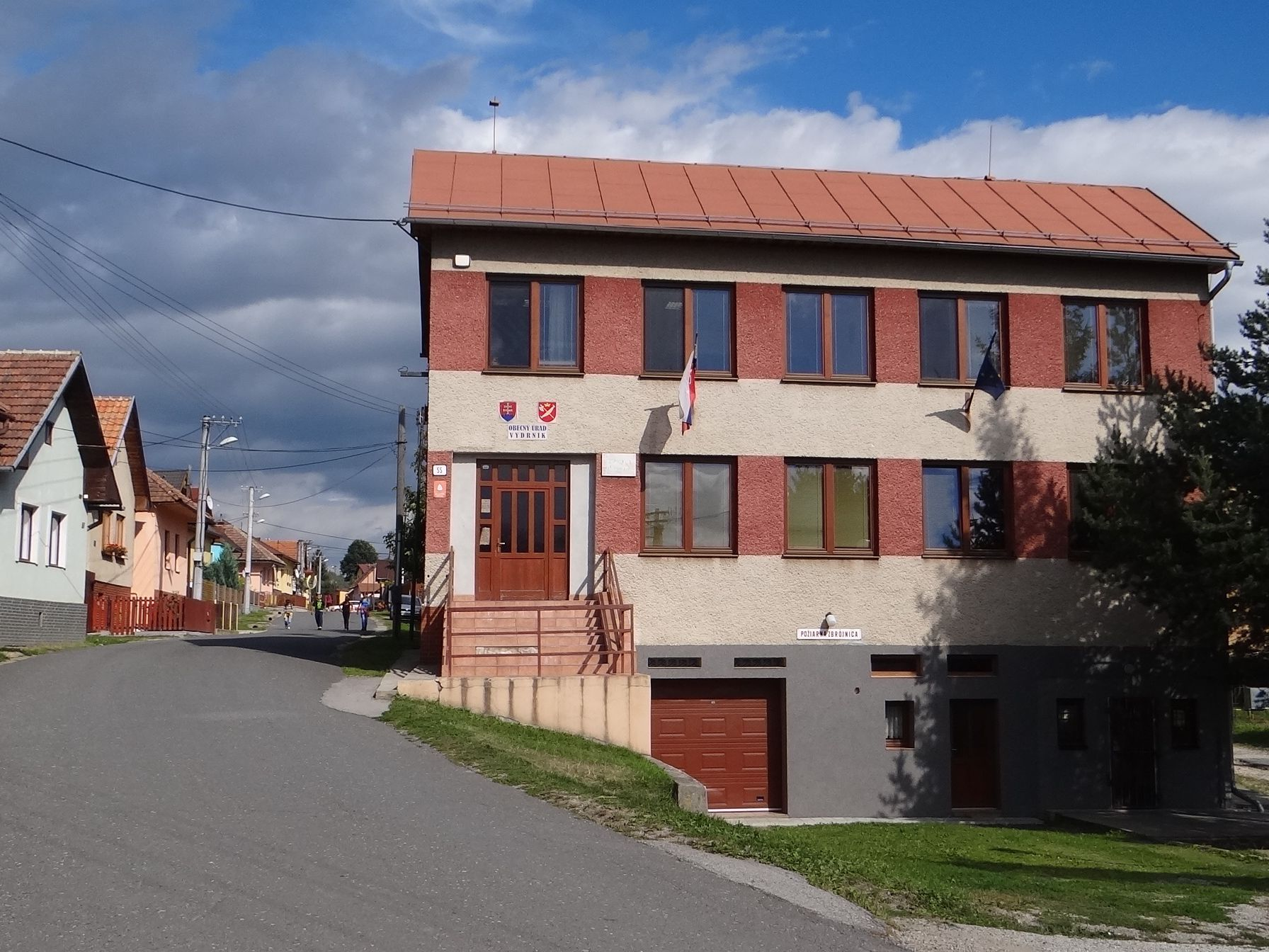 Vydrník